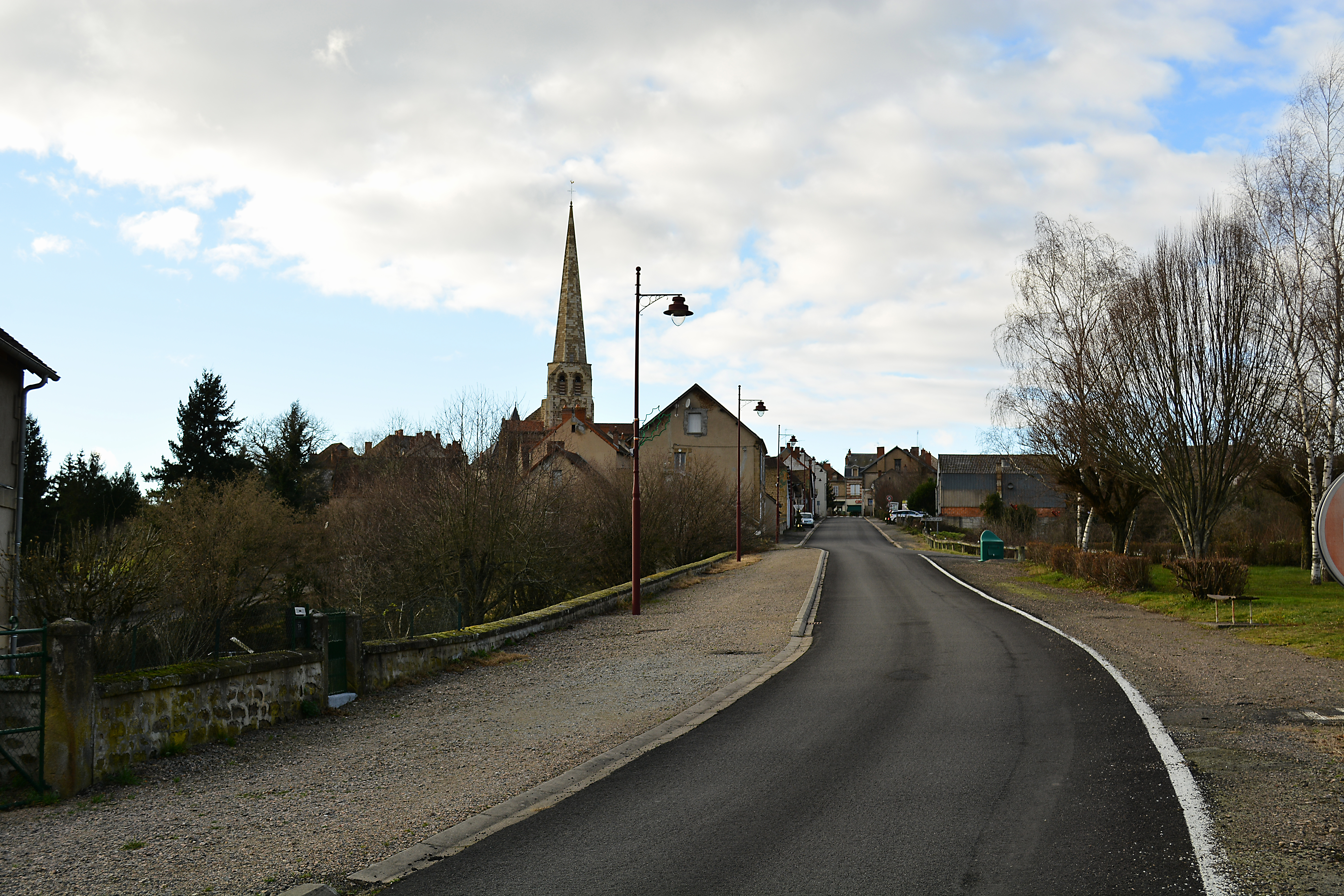 Rue menant au centre ville.